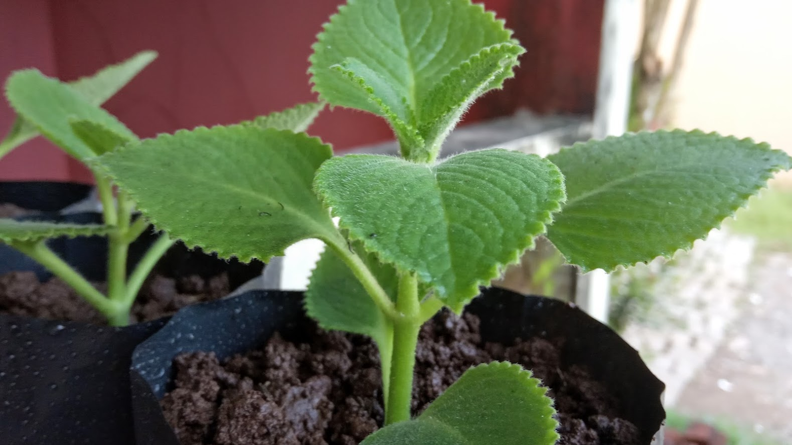 Daun Jintan atau Daun Bangun Bangun